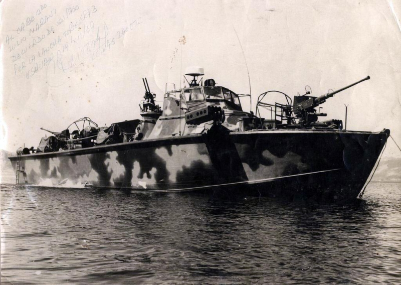 ARA Alakush (P-82) Entregada a la PNA en 1962 como patrullera.